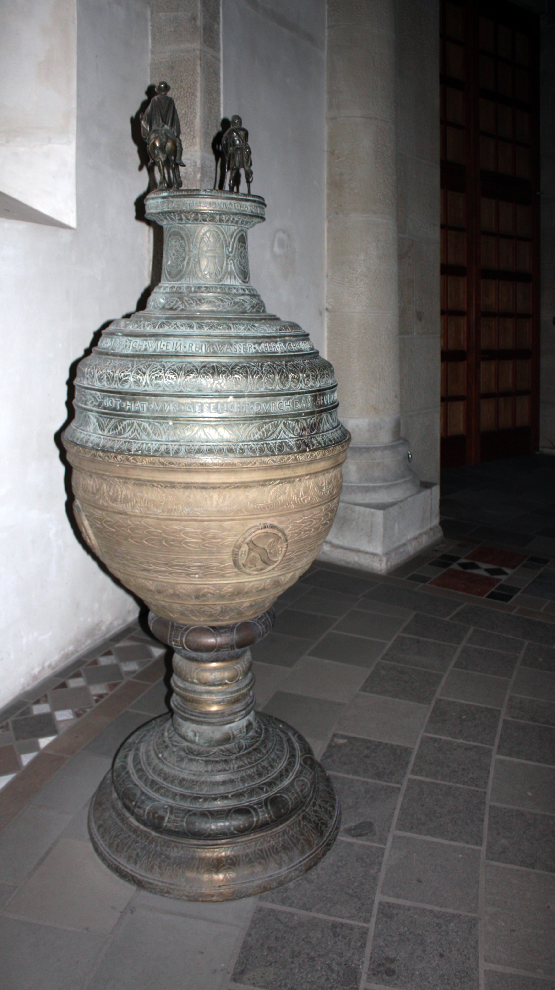 Klein St. Martin, Taufbrunnen mit einem Becken aus Bronze um 1594. Die Deckelbekrönung stellt den hl. Martin dar, gegossen von Heinrich Wickerath. Heute in der Kirche Maria im Kapitol, Köln.